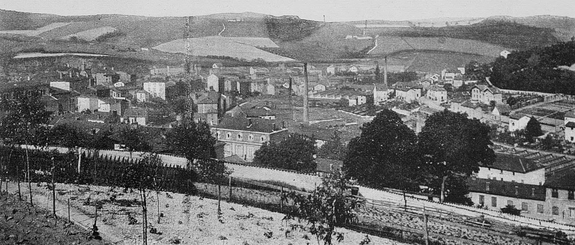 Dictionnaire illustré des communes du département du Rhône. Tome 1 / par MM. E. de Rolland et D. Clouzet.